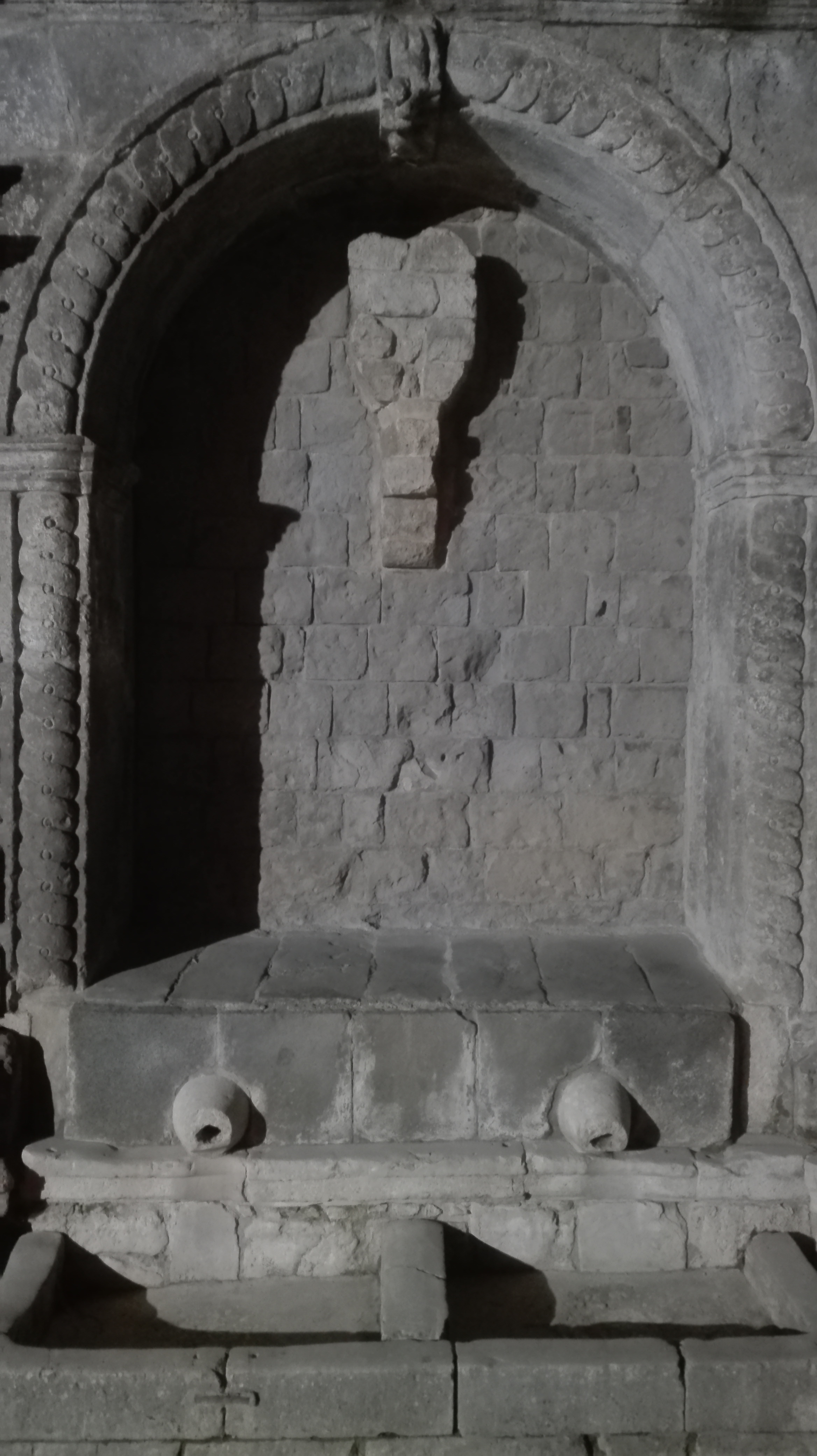 Foto scattata di notte, fontana appena restaurata